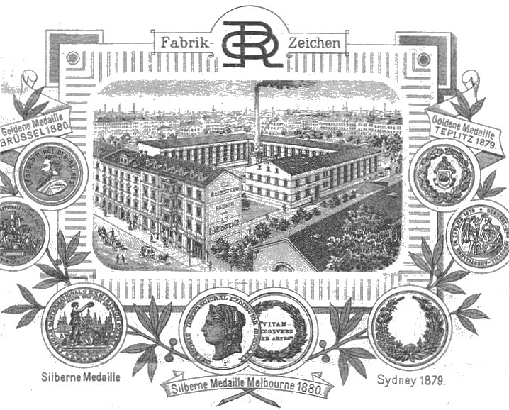 Fábrica de E. O. Richter (Catálogo de productos, 1897)